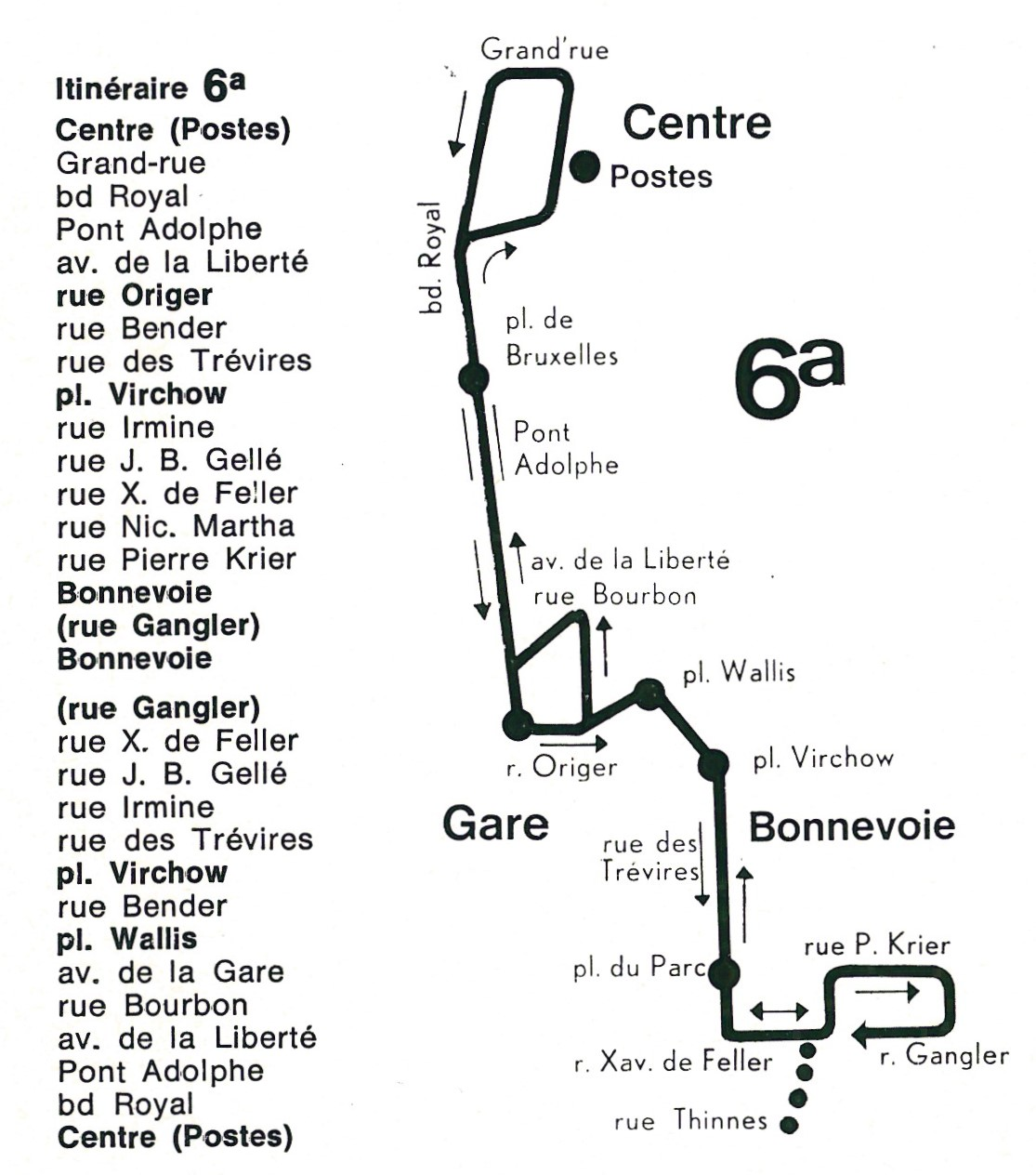 Streck vun der AVL-Linn 6A (1973)